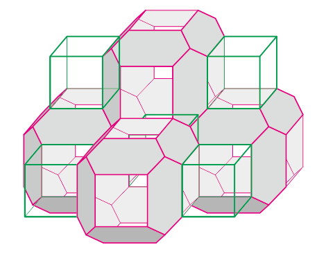 岩塩型結晶